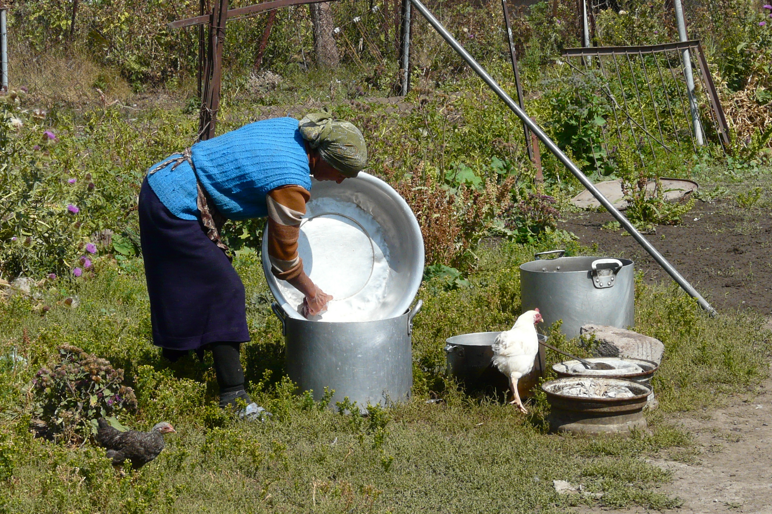 Wandeling door het dorpje Rya Taza.